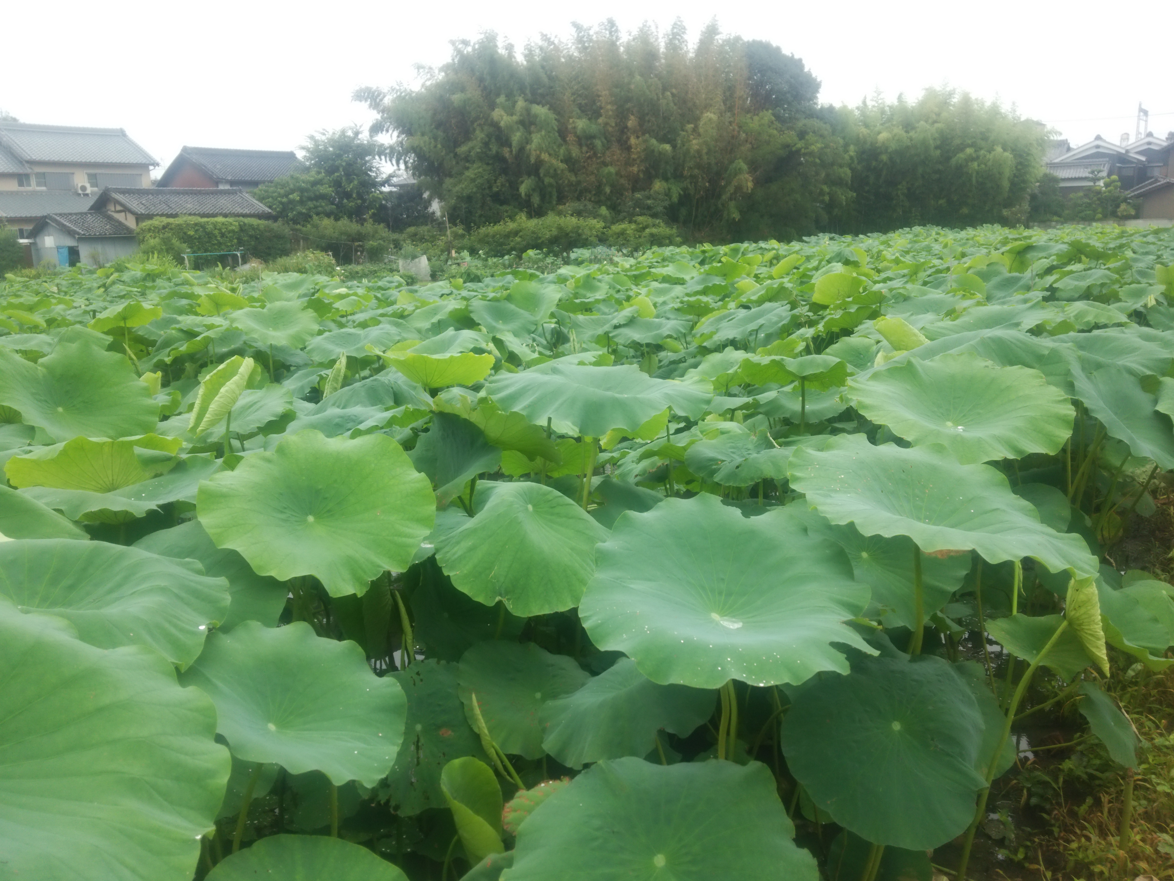 筒井城趾「シロ畠」のレンコン畑